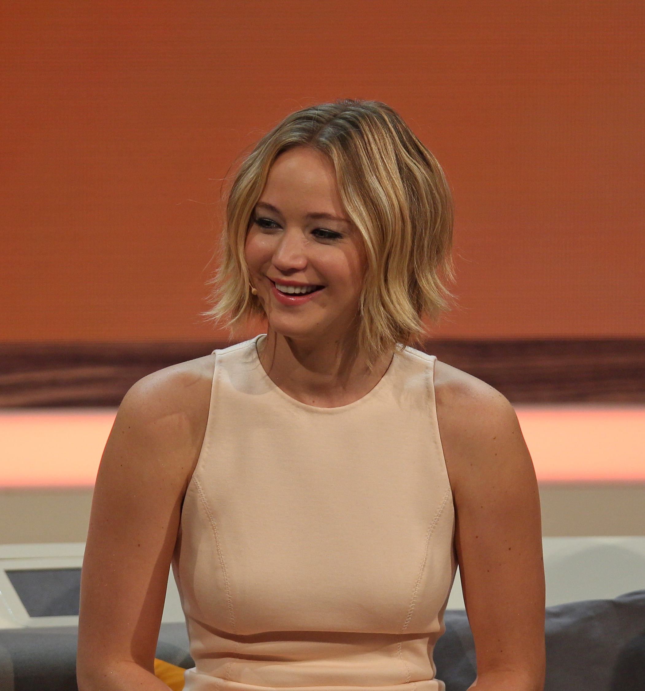 Wetten, dass.. ? 214. show in Graz, 8. Nov. 2014 Jennifer Lawrence at 214. Wetten, dass.. ? show in Graz, 8. Nov. 2014